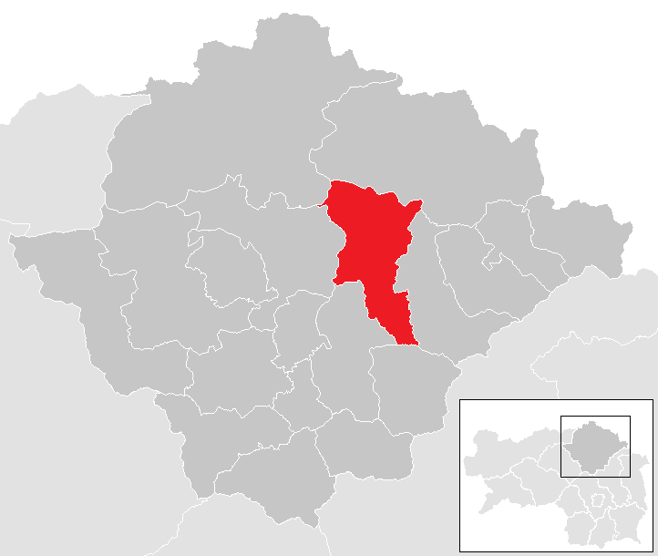 Lage von Sankt Barbara im Mürztal im Bezirk Bruck-Mürzzuschlag